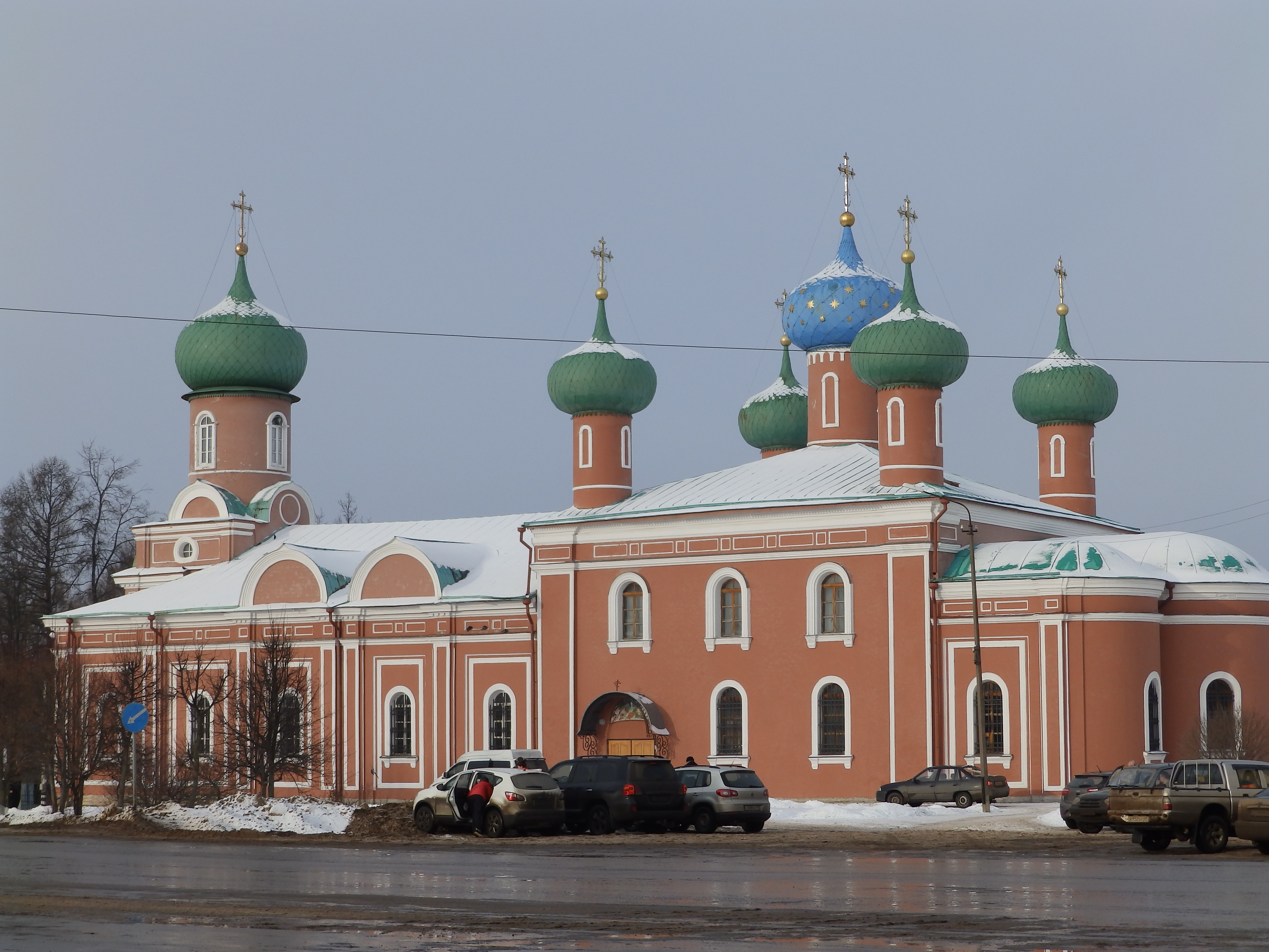 Тихвин. Кафедральный собор Спаса Преображения.